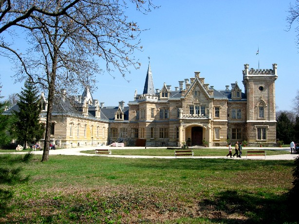 Nádasdy kastély, Nádasdladány. Saját kép. Egresi János 2006. szeptember 23., 12:07 (CEST)